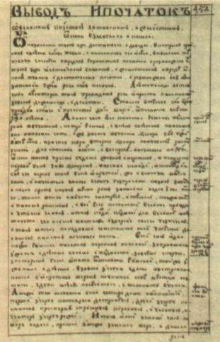 Lithuanian and Samogitian Chronicle, Tobolsky manuscript page Хроника литовская и жмойтская, страница Тобольского списка